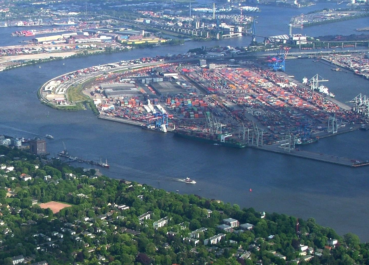 Luftaufnahme des Hamburger Containerhafens mit Köhlbrandbrücke und Stadtteil Othmarschen (vorne).